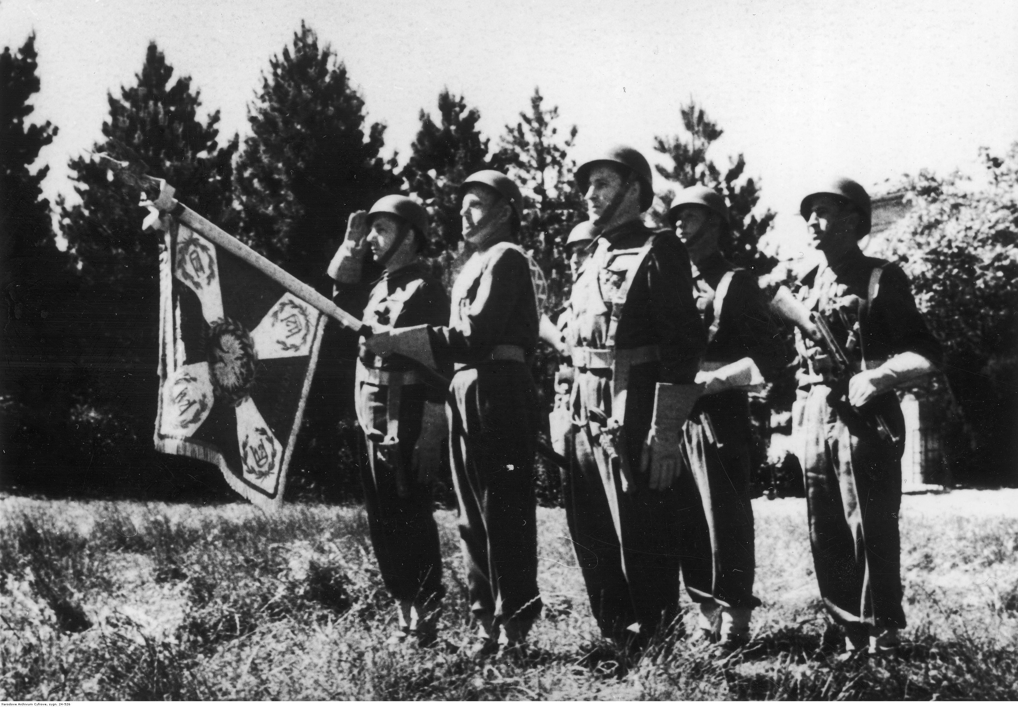 Poświęcenie sztandaru 12 Pułku Ułanów Podolskich 3 Dywizji Strzelców Karpackich we Włoszech; 11 listopada 1945, Cignoli k. Ankony. Uroczystość poświęcenia sztandaru ufundowanego przez 318 Gdański Dywizjon Myśliwsko-Rozpoznawczy. Archiwum Fotograficzne Tadeusza Szumańskiego. Sygnatura: 24-526